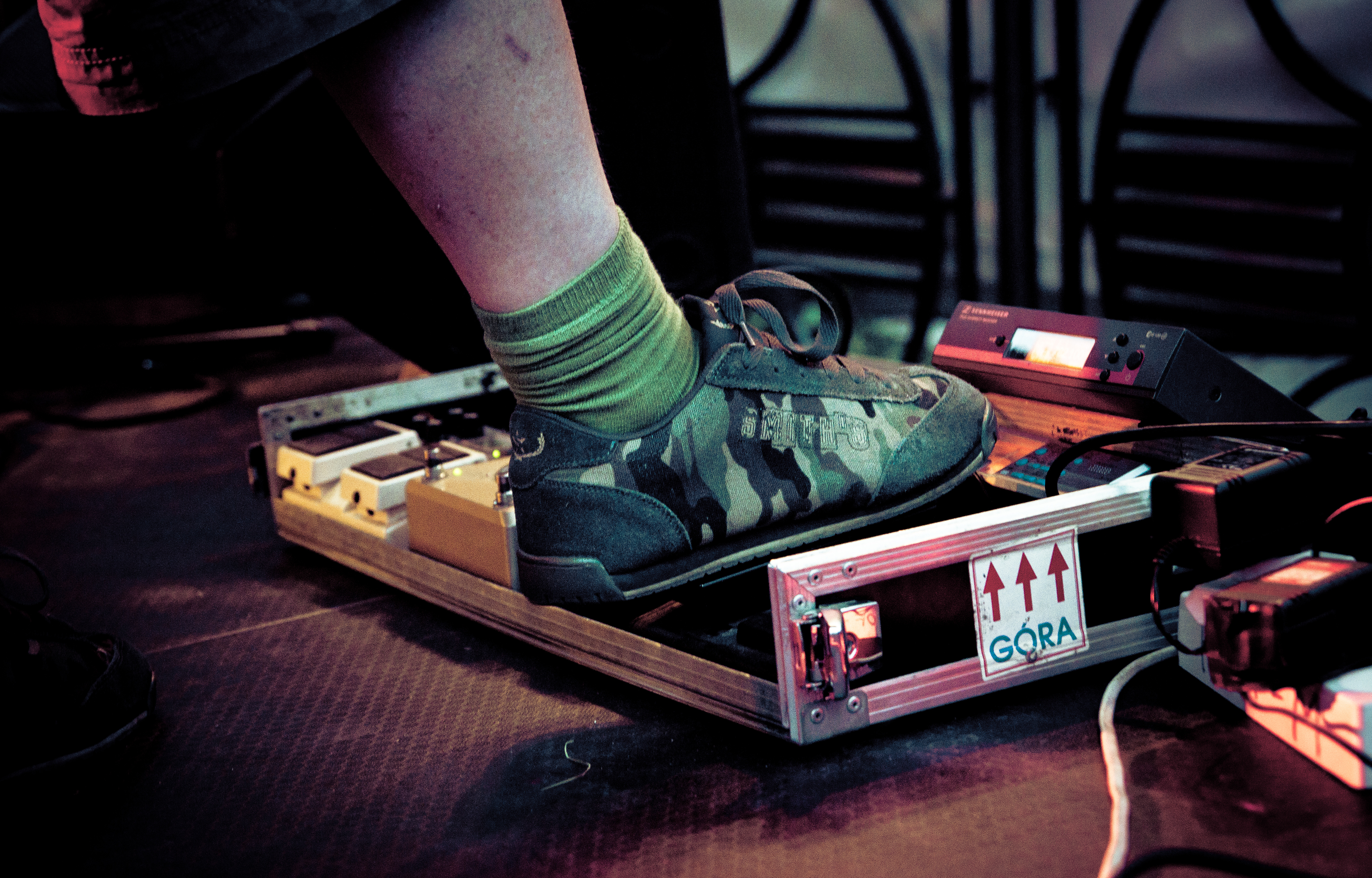 Krzysztof Misiak, gitarzysta i lider zespołu 3 Jazz Soldiers podczas koncertu w pubie Rock'69. Zakończenie warsztatów instrumentalnych Rockowe Ogródki, 13. lipca 2012, Płock.